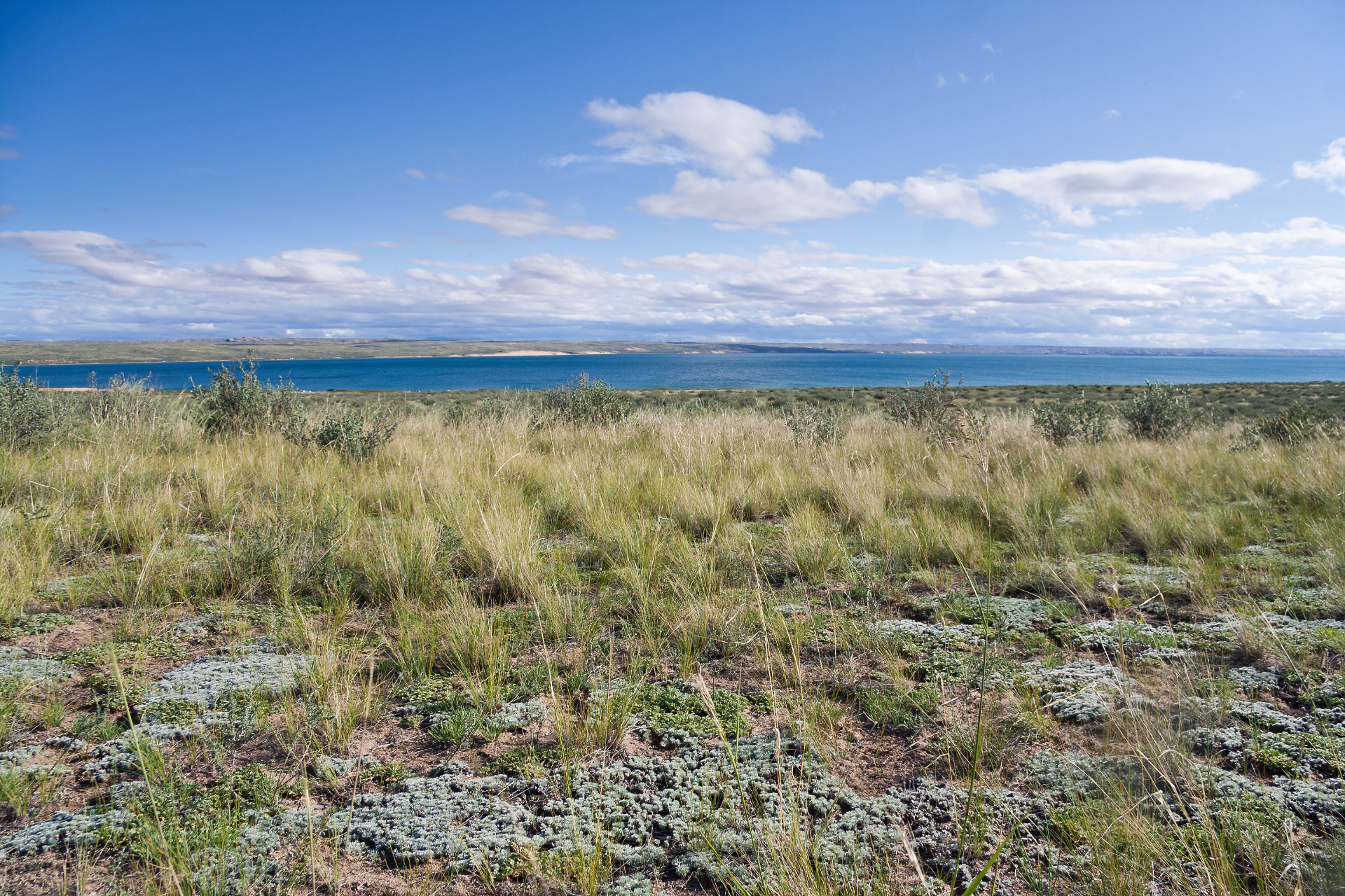 Озеро Торе-Холь: Эрзинский кожуун, Тува This image is related to the protected area of Russia number 1710052